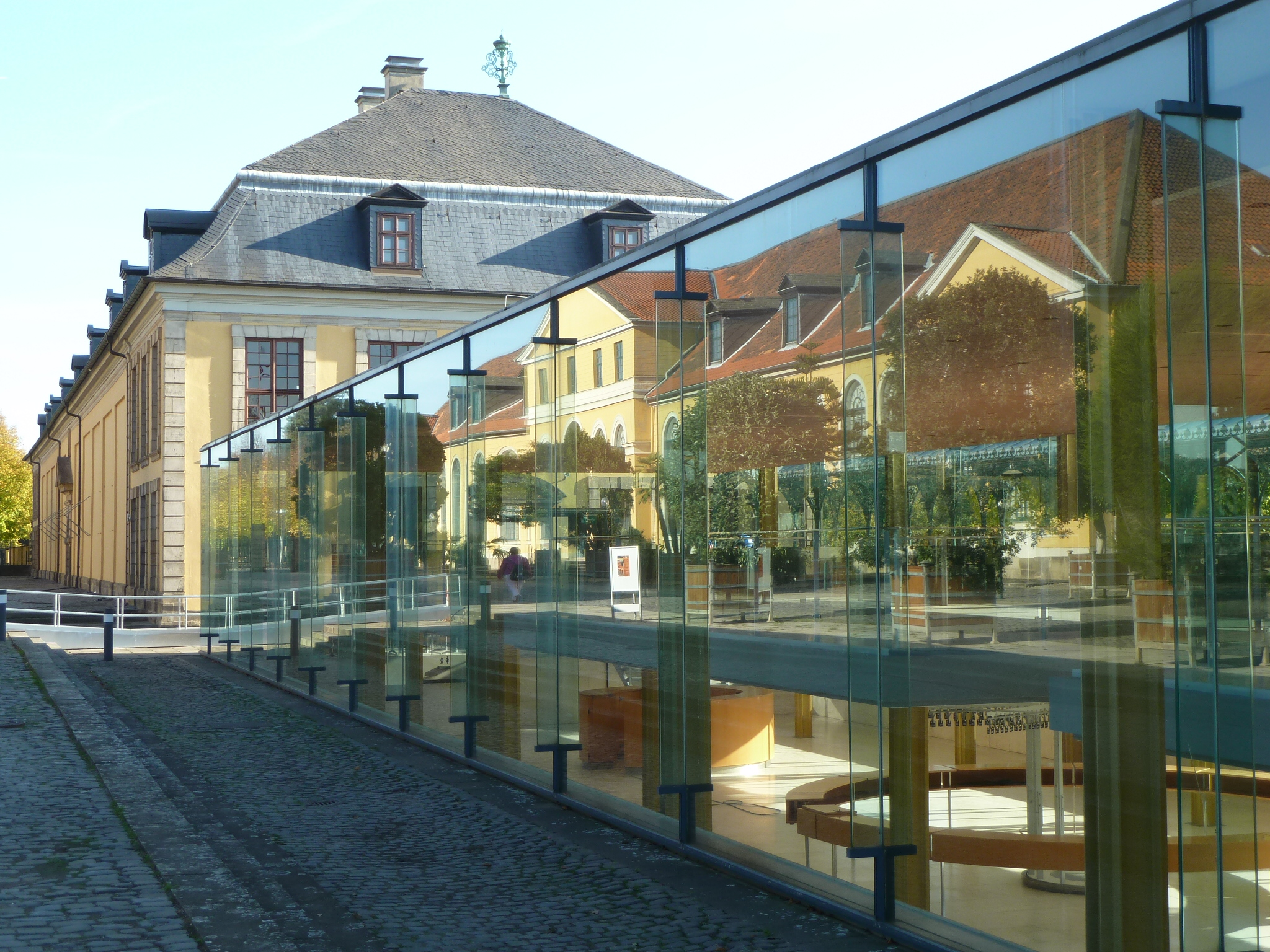 Glasfoyer im Großen Garten, erbaut nach Plänen von Arne Jacobsen